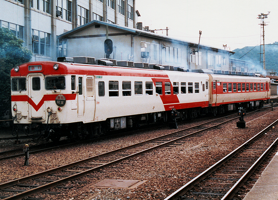 国鉄四国 団体専用車色 キハ28 2476 +急行色キハ58 急行「阿波」 （キハ28 2476の色は団体専用車色だが、アップグレード車として定員は60名でカラオケ冷水器なしで竣工しており、この車のみ回転クロスシート車でもあった。）